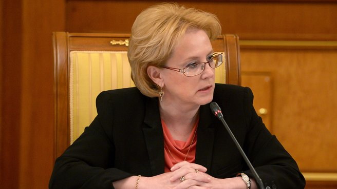 Глава Минздрава Вероника Скворцова